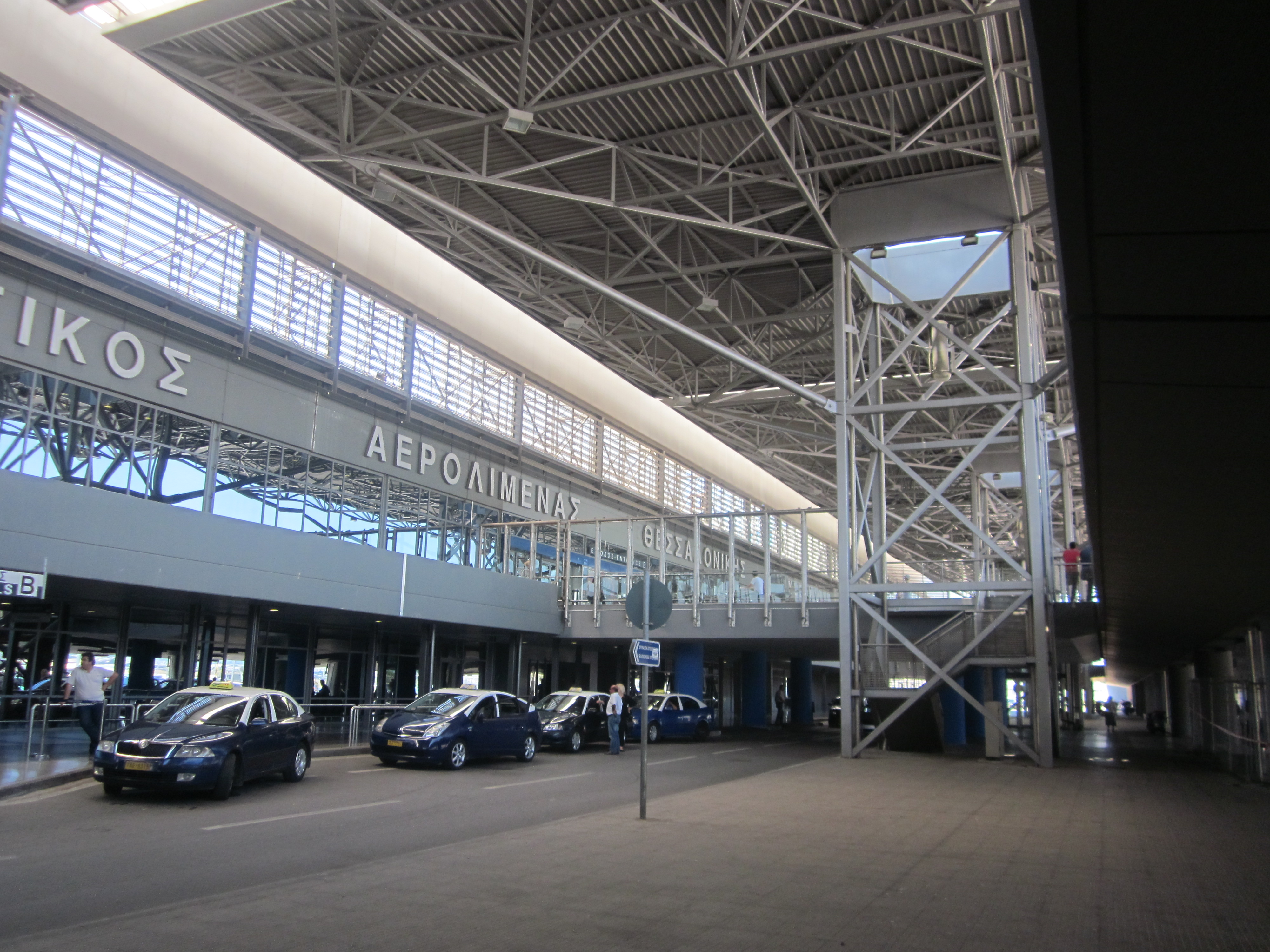 テッサロニキ・マケドニア国際空港